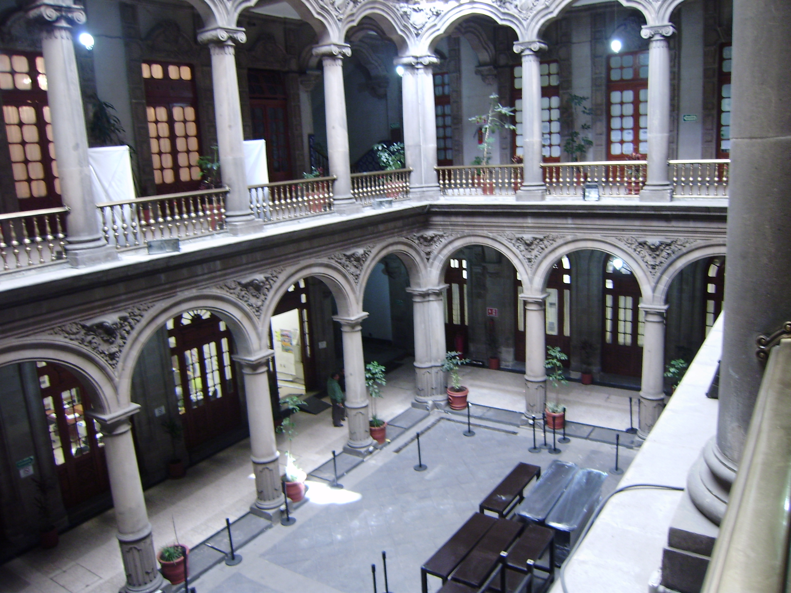 Uno de los patios internos del Antiguo Palacio del Ayuntamiento